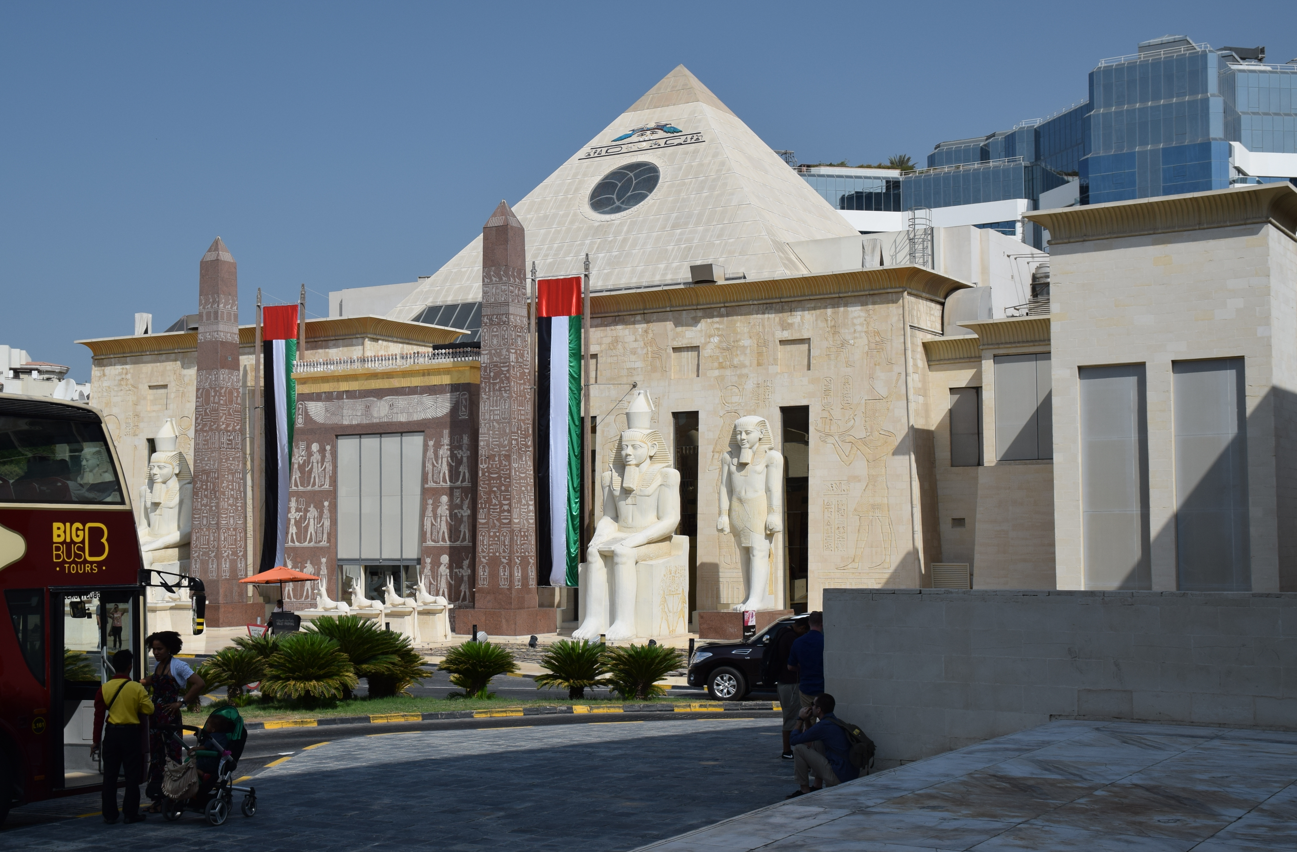 Courtyard from Wafi Mall, close to Oud Metha District, Dubai